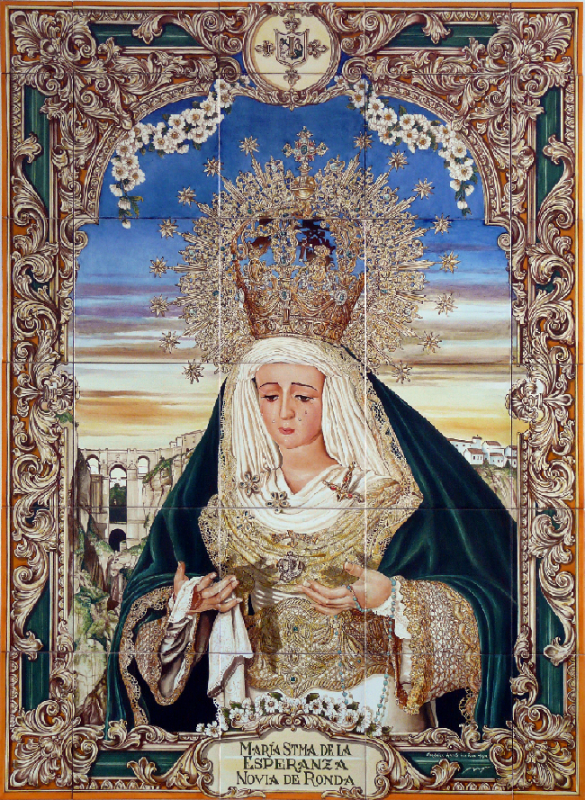 Obra del artista sevillano Don Francisco Moya